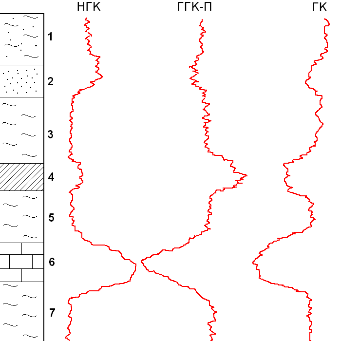 Сравнение показаний разных видов ядерного каротажа на разрезе скважины